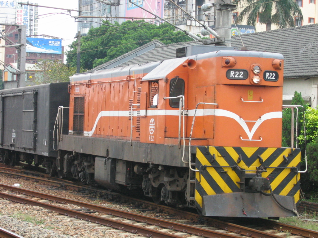 中文（台灣）: 臺灣鐵路管理局柴電機車R22。